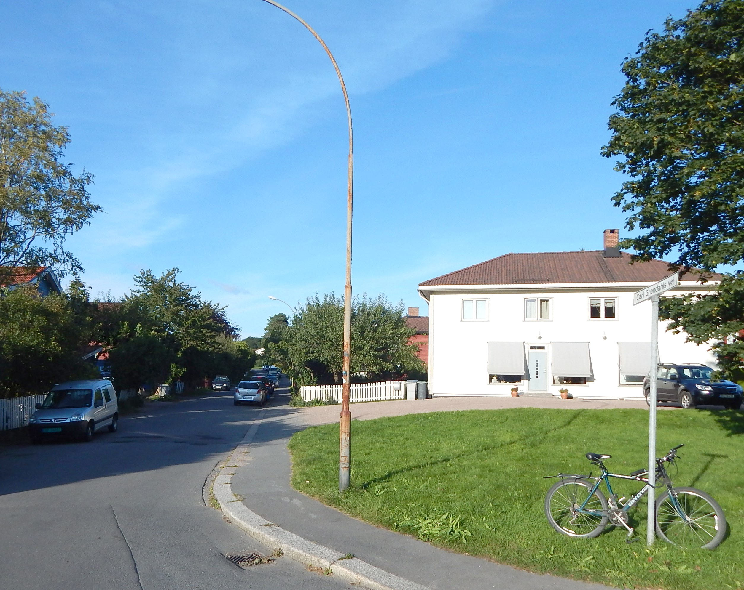 Carl Grøndahls vei sett fra Biskop Heuchs vei